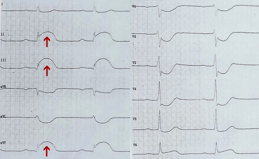 EKG eines akuten diaphragmalen Infarkts (Pfeile: ST-Hebung in II, III und aVF) Fotograf/Zeichner: selbst gescannt / own work Datum: ca. 2003 (hochgeladen 03. Oktober 2005) andere Versionen